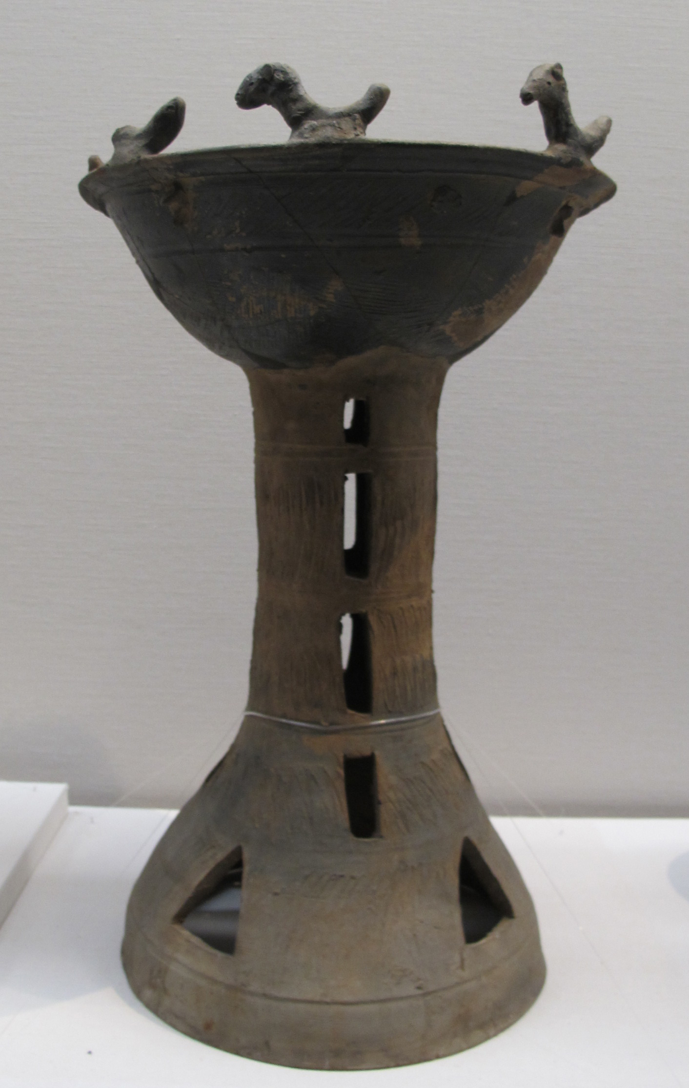 Periodo kofun, giara con decorazioni a forma di uccelli, VI sec